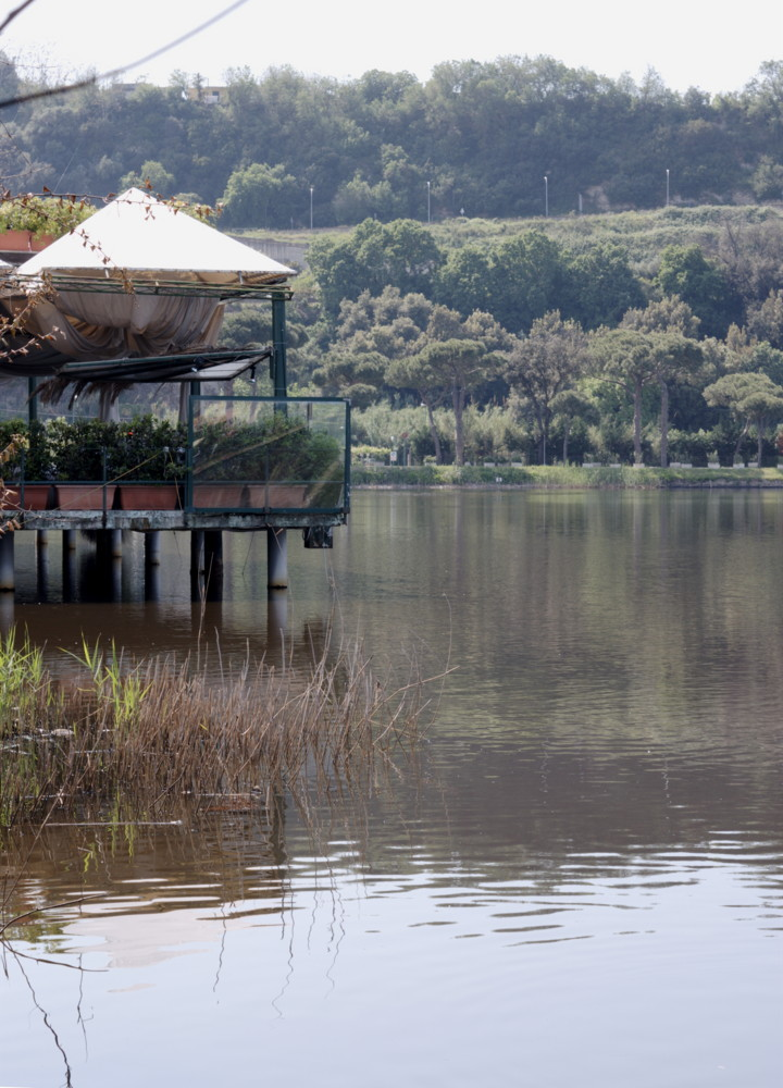 particolare del Lago di Lucrino. Lungo le sponde del Lago si trovano numerosi ristoranti e la foto ritrae la palafitta su cui sono collocati i tavoli all'aperto di uno di essi. Autore foto: Roberto De Martino